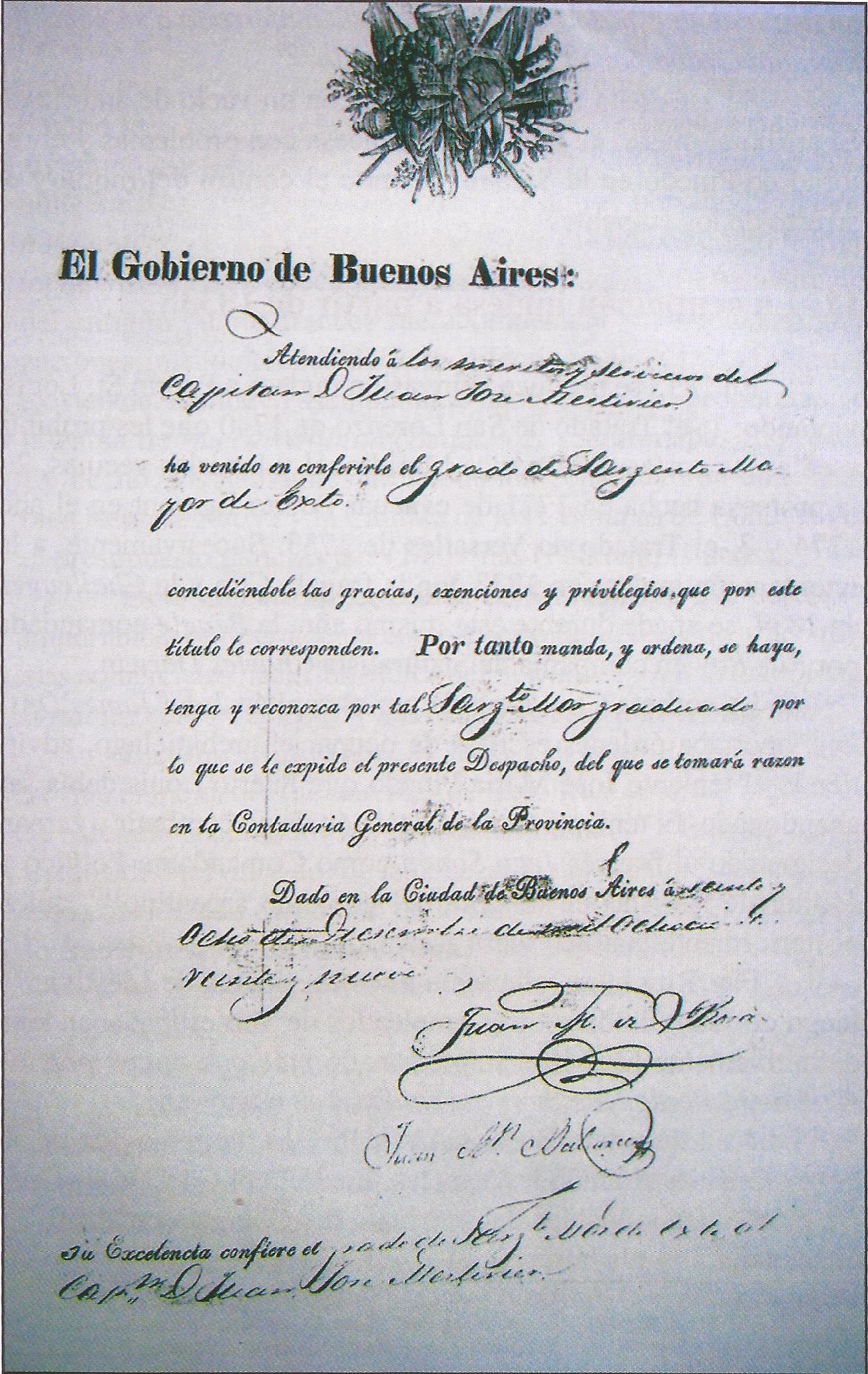 Legajo de Juan Esteban Francisco Mestivier (comandante político-militar de las Islas Malvinas como parte de las Provincias Unidas del Río de la Plata) nombrándolo con el grado de Sargento Mayor en Buenos Aires, firmado por Juan Manuel de Rosas.